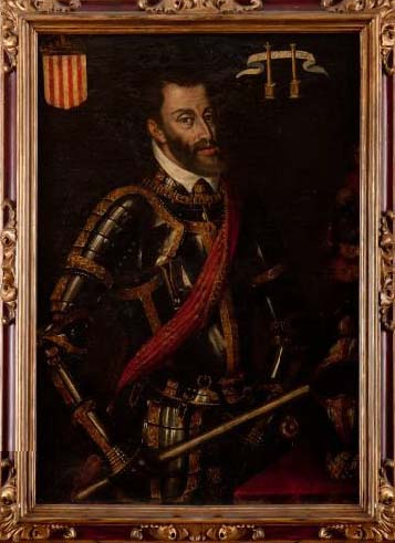 Retrat imaginari del comte Carles I de Barcelona